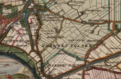 Babberspolder.